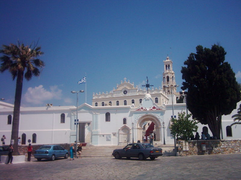 Panaghia Church / Eglise de la Panaghia